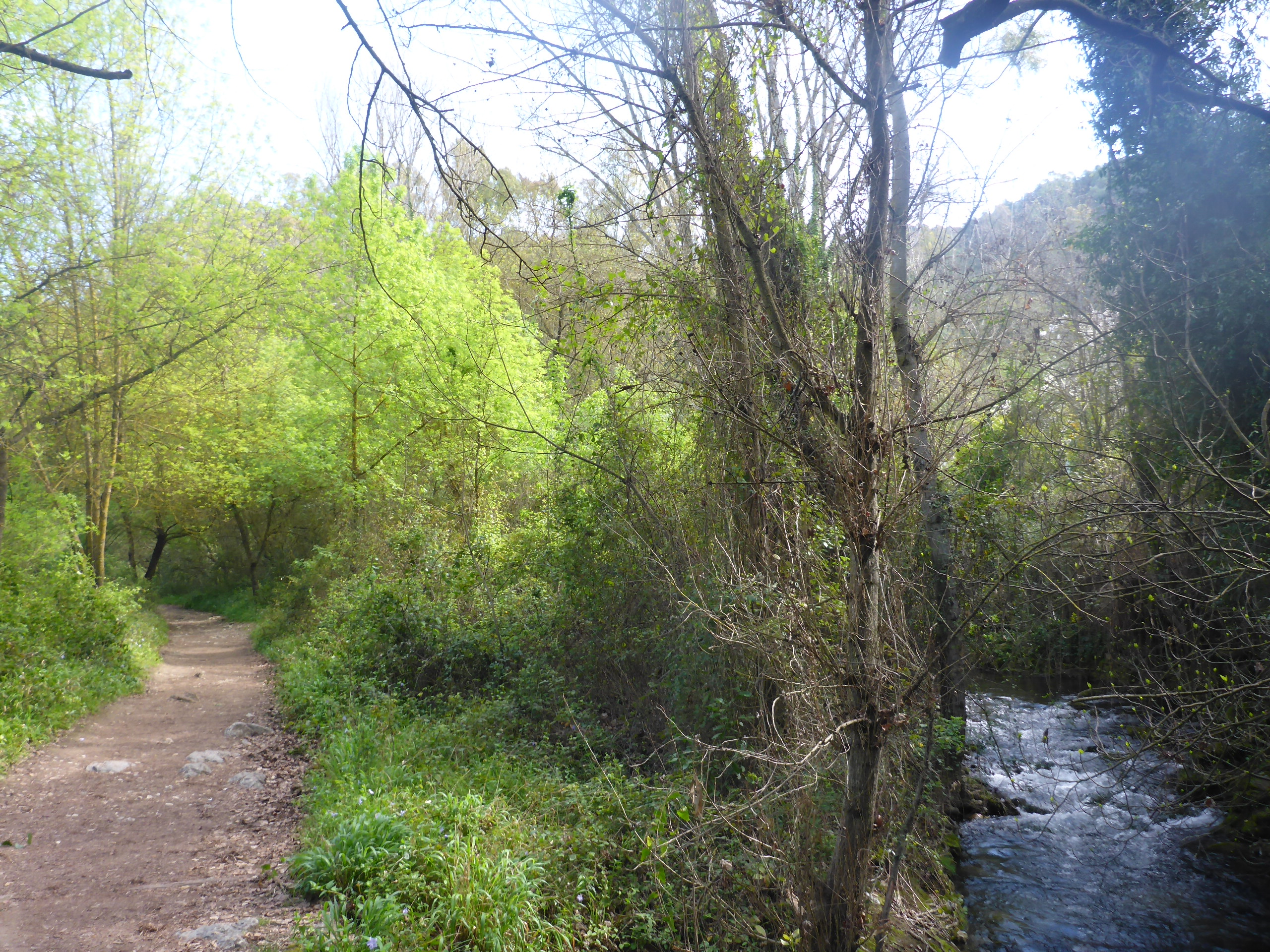 Río Majaceite a su paso por El Bosque (provincia de Cádiz, España)